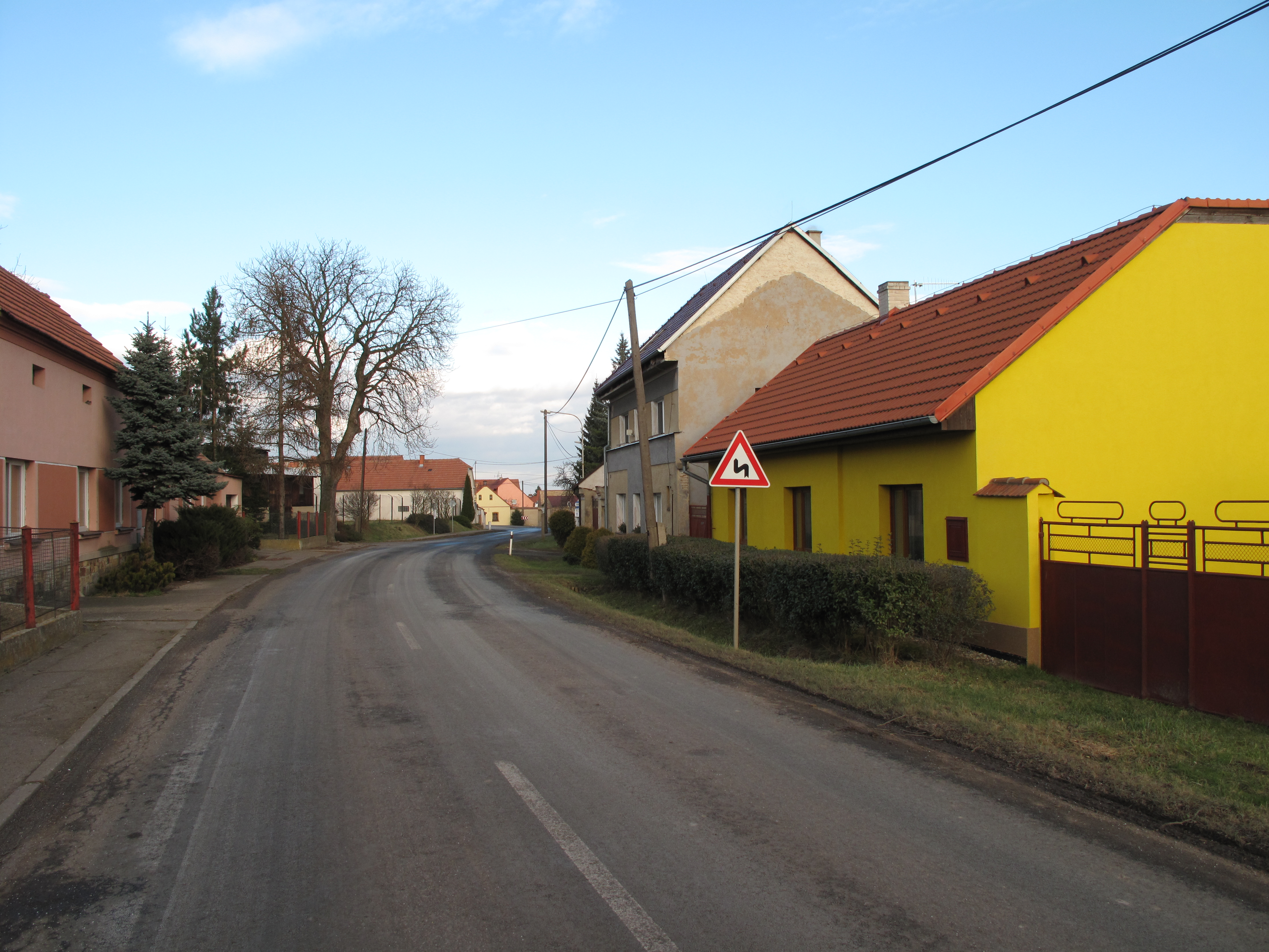 Ulice v Evani. Okres Litoměřice, Česká republika.